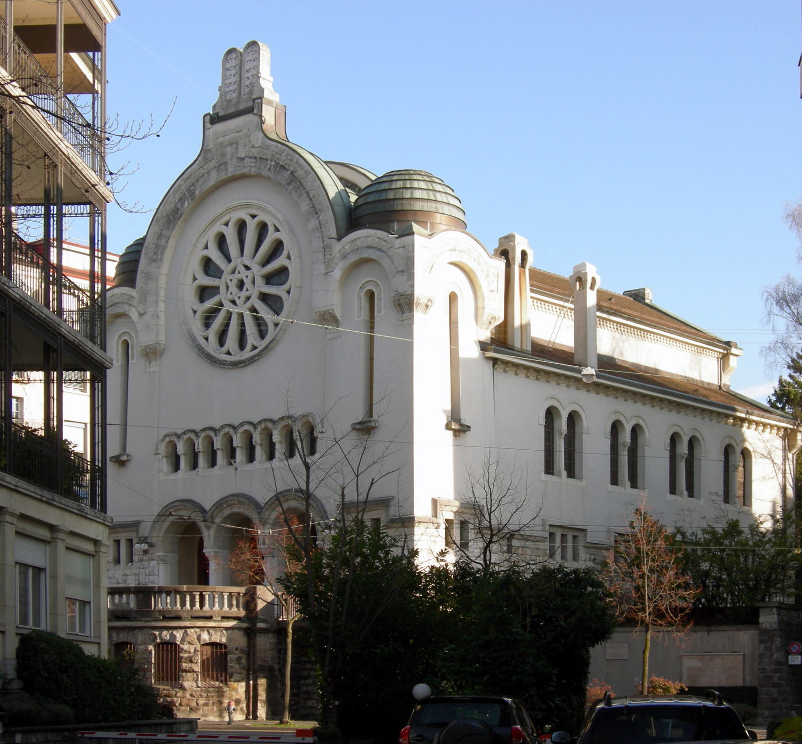 Lausanne, synagogue